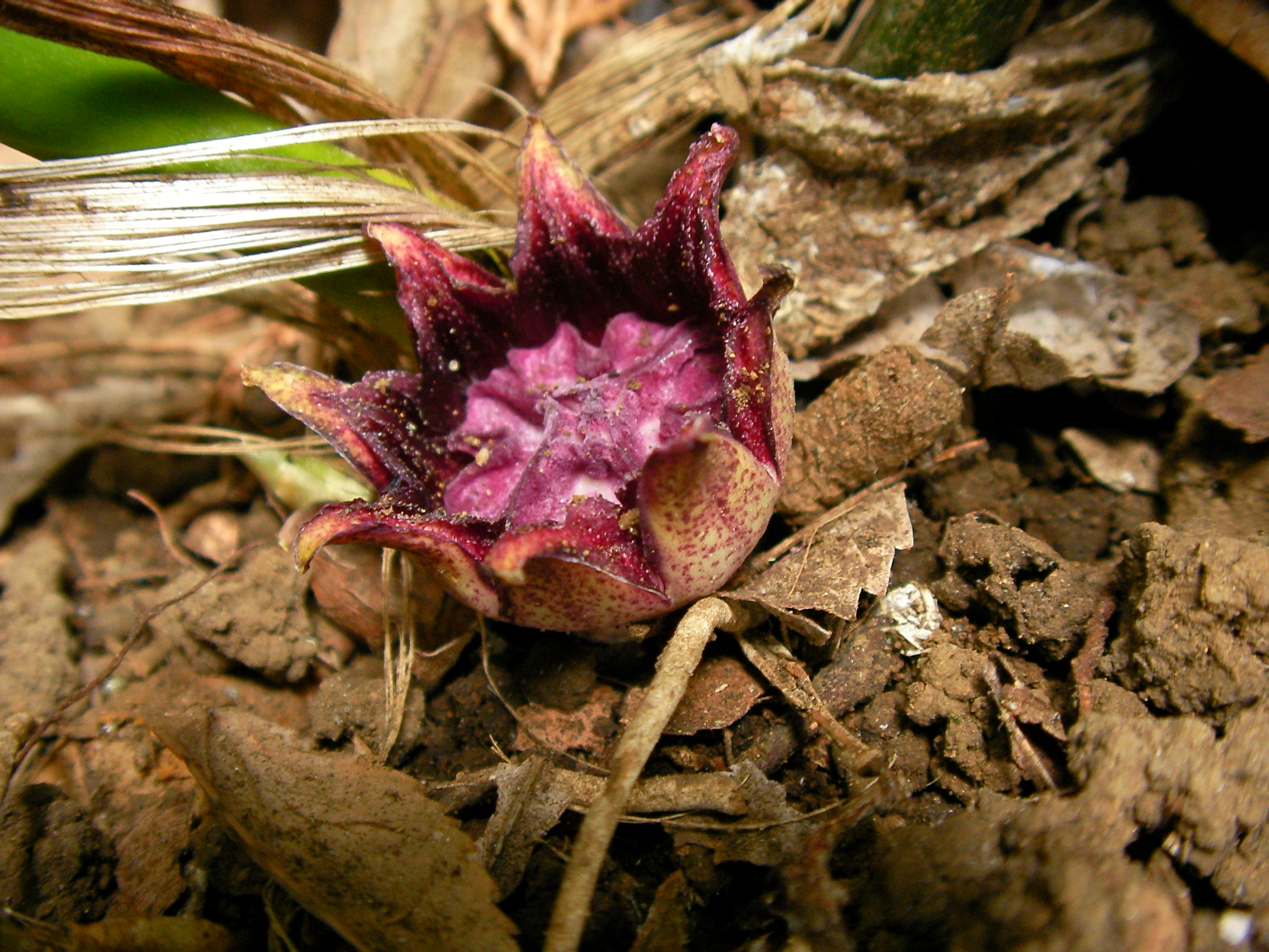 ハラン[葉蘭][Aspidistra elatior]-花